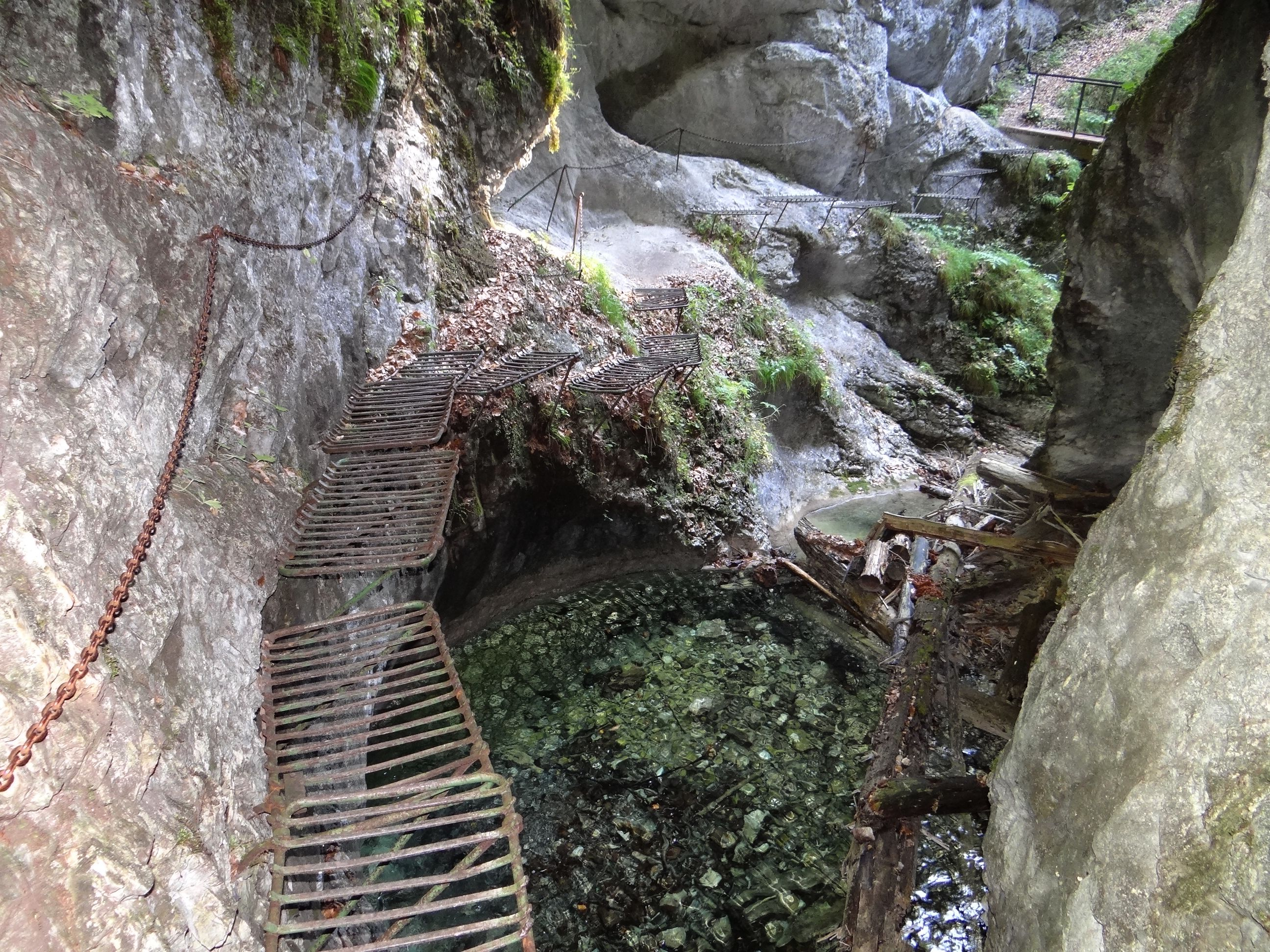 Kyseľ (Slovenský raj)